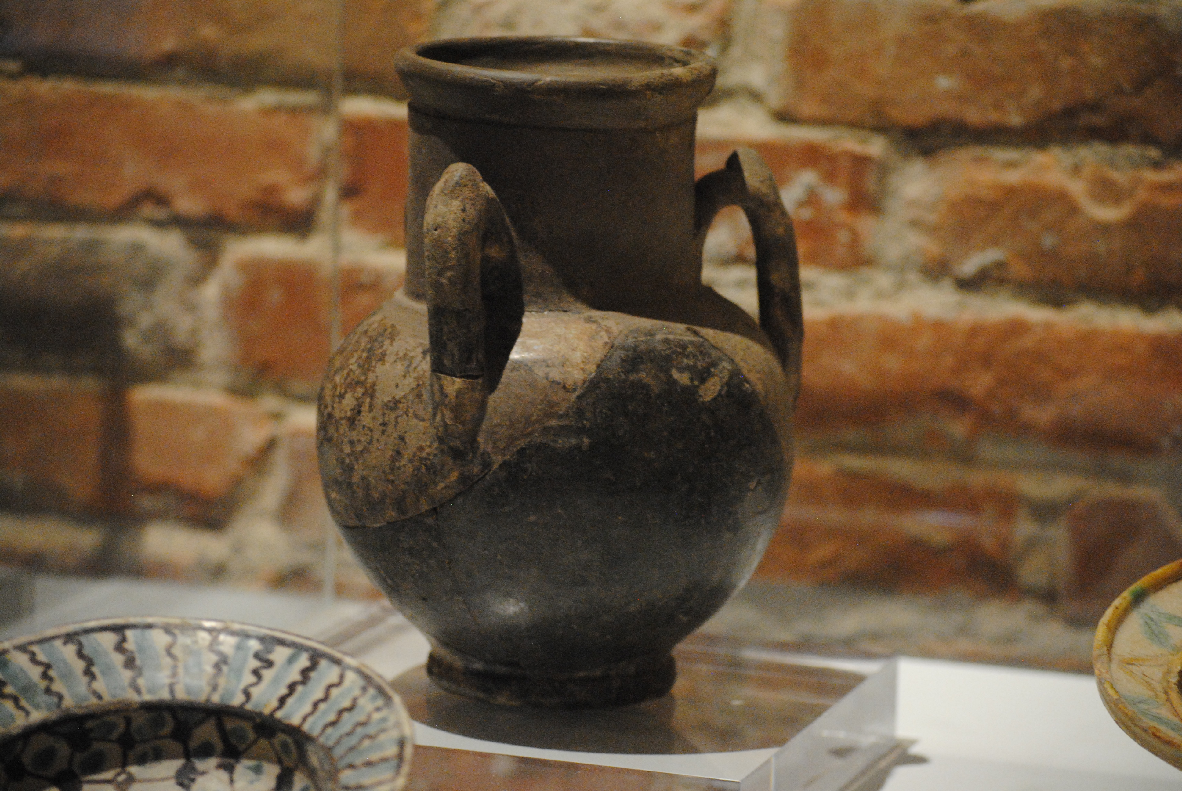 Brocca triansata in maiolica monocroma, importata dalla Spagna meridionale (al-Andalus) alla fine dell'XI - inizi XII secolo (recuperato durante gli scavi in piazza Dante, Pisa) - Museo Nazionale di San Matteo.